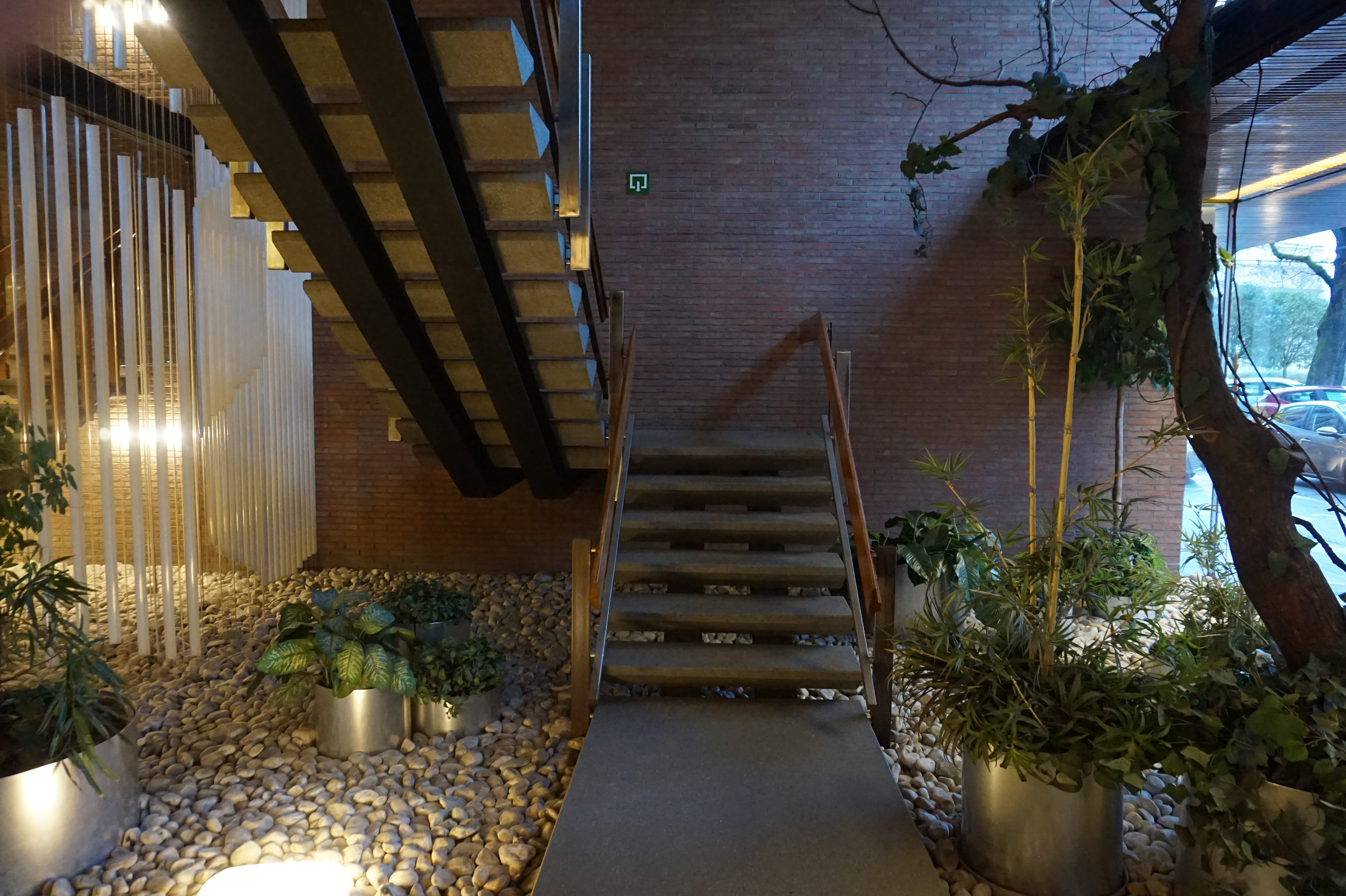 Escaliers en béton, installation artistique de Walter Leblanc à gauche, installations de plantes sur la droite de Jean Delogne